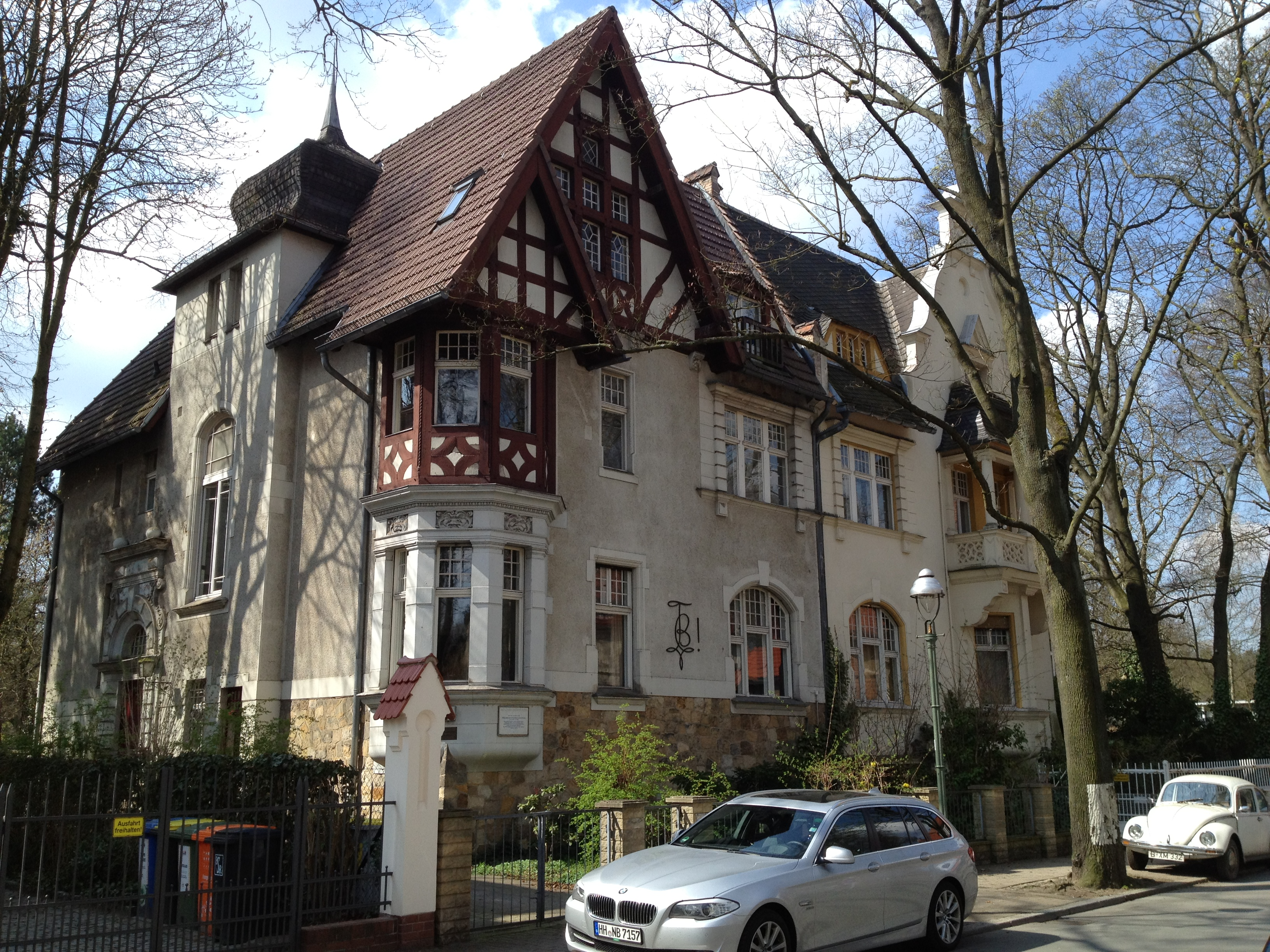 Corpshaus aus Sicht der Villa Epstein